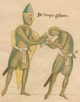 Knights and Helmet in Hortus Deliciarum